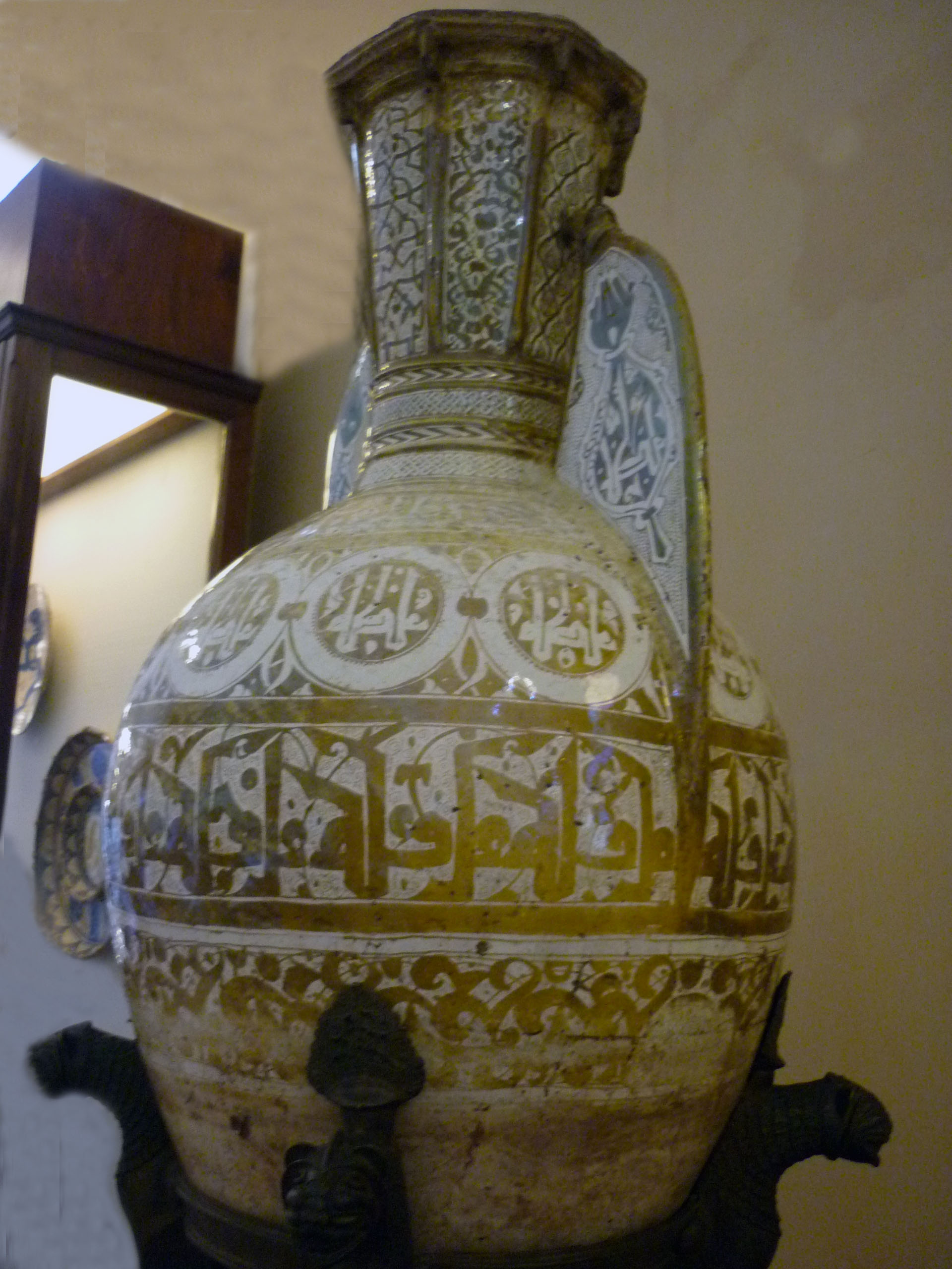 Vaso de Fortuny, de cerámica hispano.morisca con reflejos metálicos procedente de Málaga (España) datado del siglo XIV conservado en el Museo del Ermitage ( San Petersburgo)